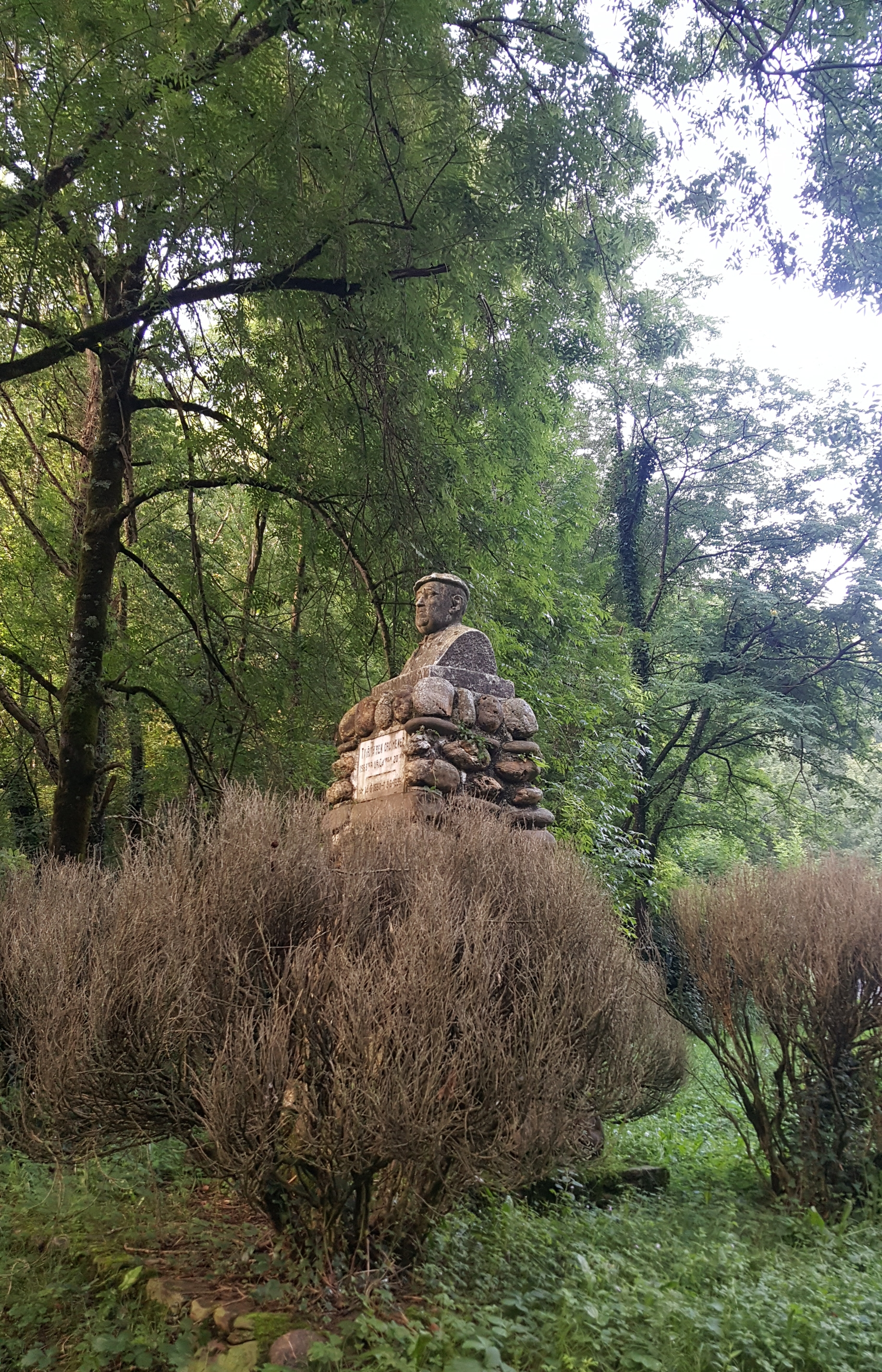 Txirritaren omenez Hernaniko Latzen dagoen eskultura